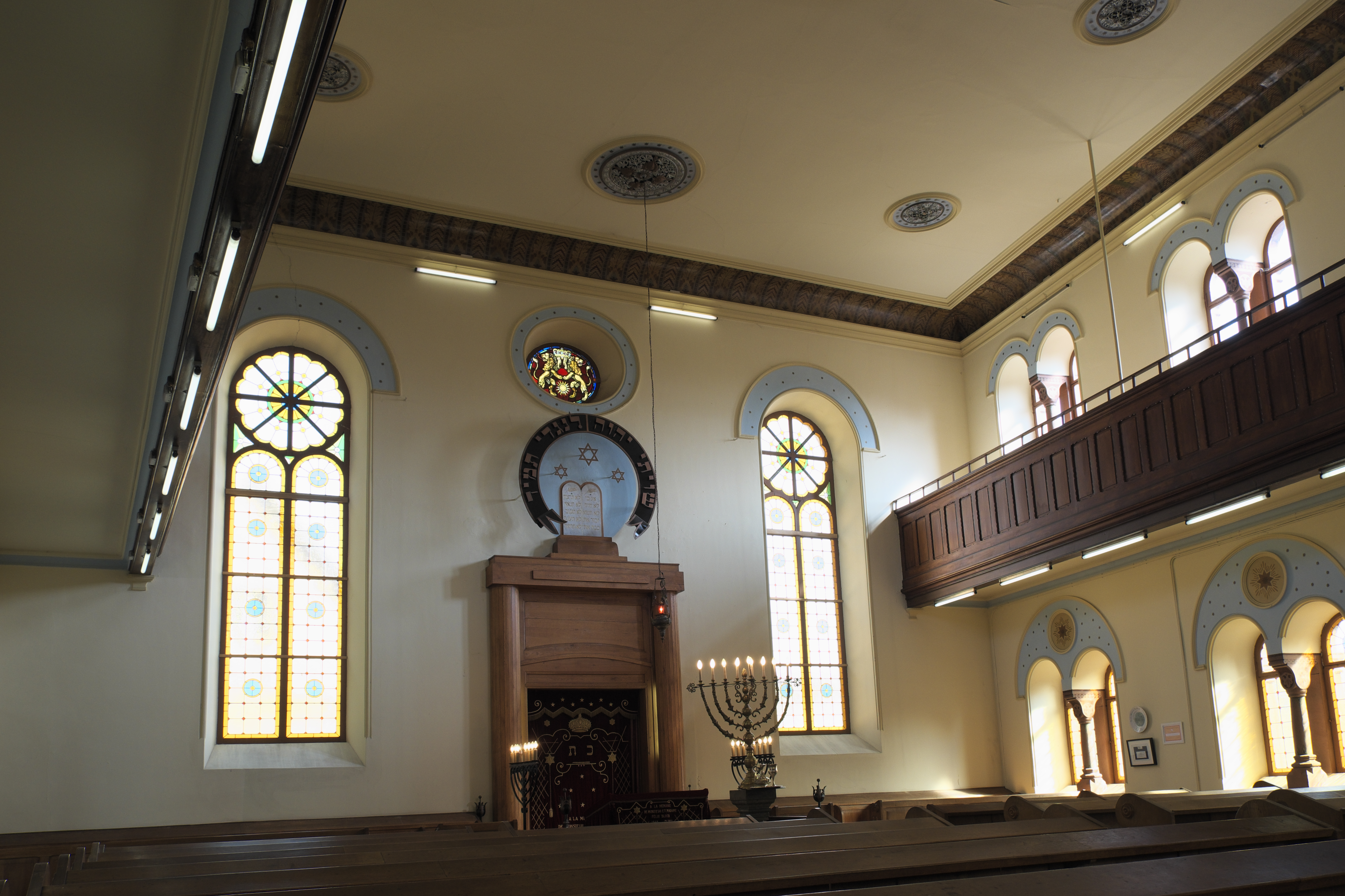 Synagoge in Ingwiller im Département Bas-Rhin (Region Alsace-Champagne-Ardenne-Lorraine/Frankreich), Innenraum